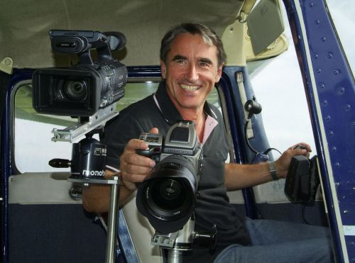 Pilot und Luftbildfotograf Gerhard Launer in seiner Cessna C172 bei einem Luftbildflug.